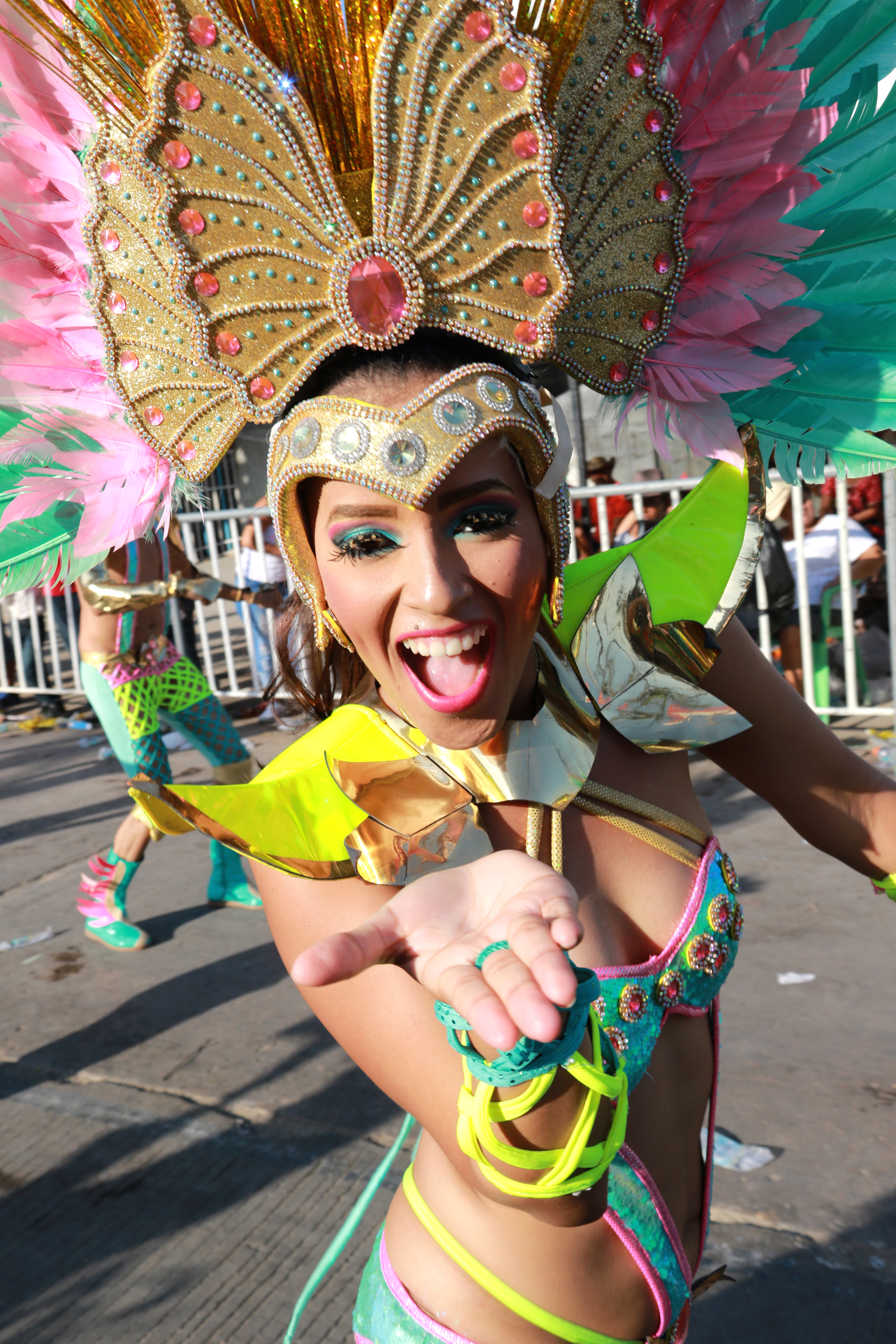 Colombie, carnaval de Baranquilla